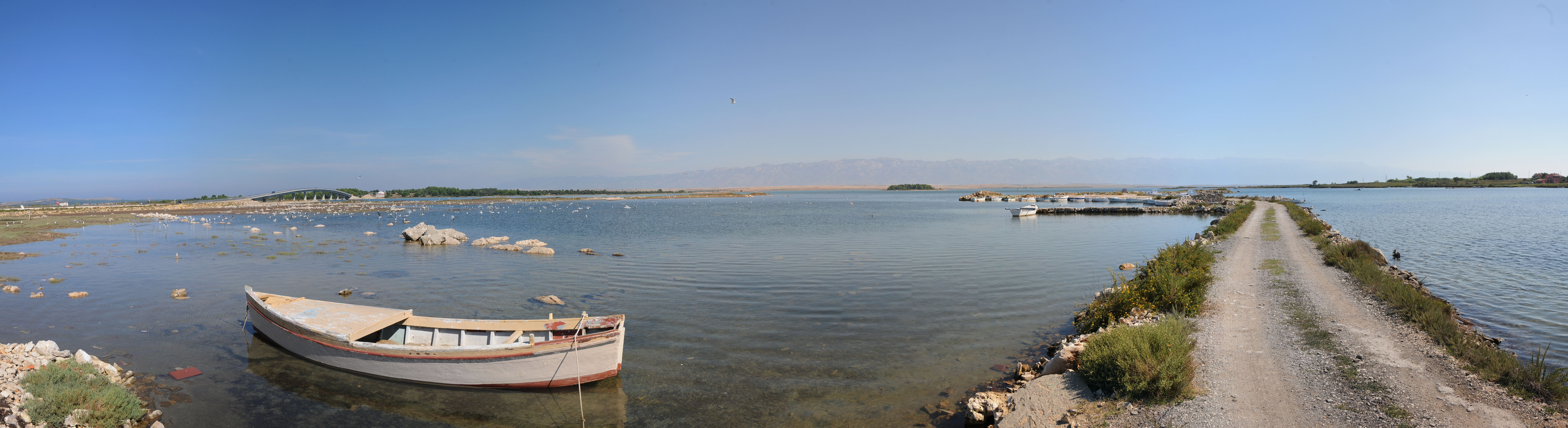 Panorama mit mehreren Bilder: Fischerboote, im Hintergrund die Brücke von Privlaka (Dalmatien) nach Vir (Kroatien).